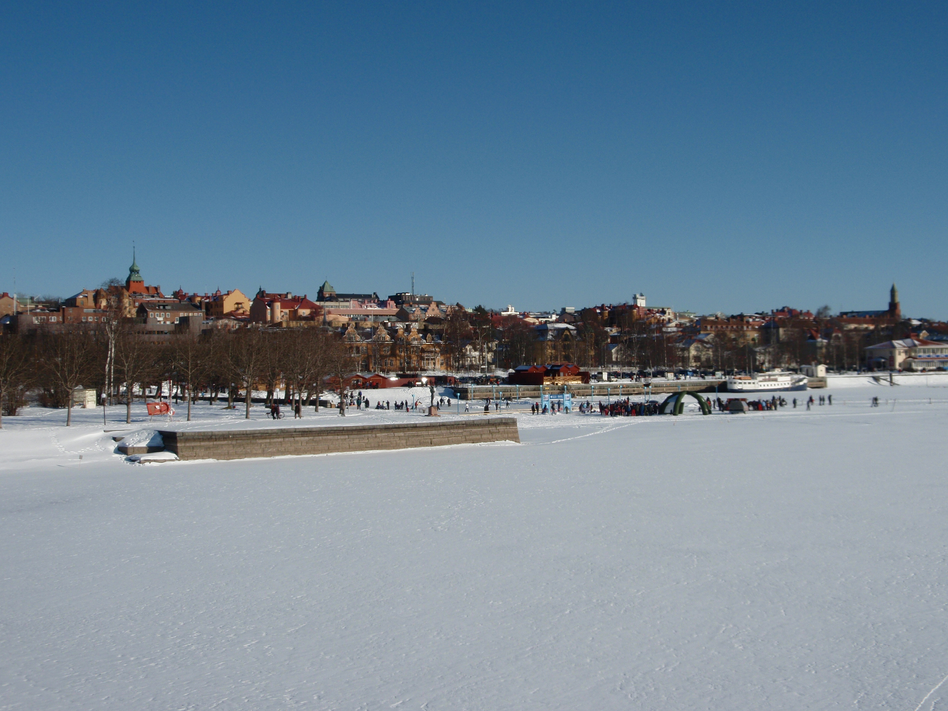 Östersund and Badhusparken